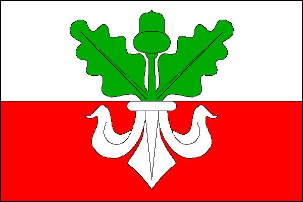 Vlajka obce Zástřizly